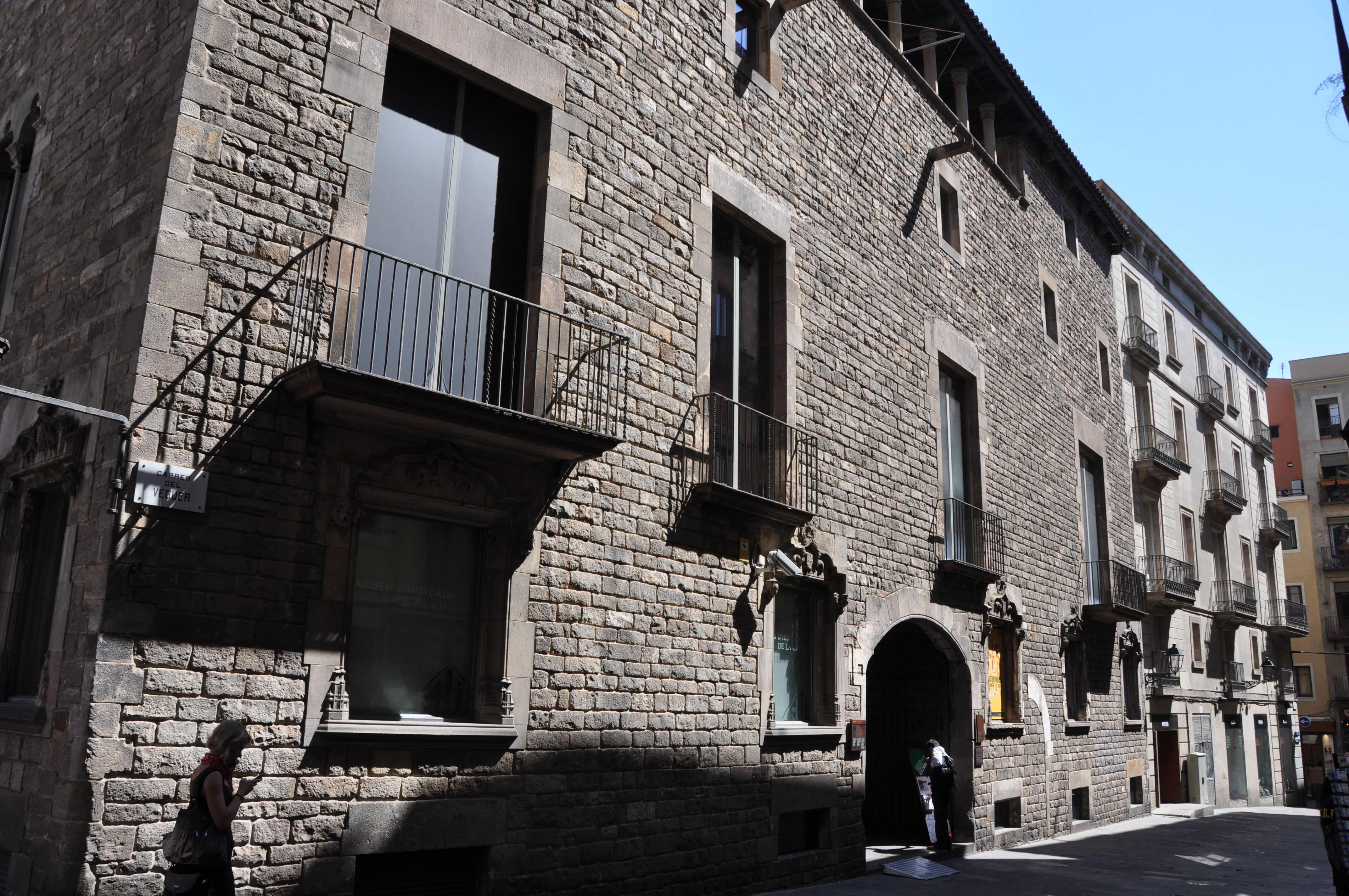 Façana principal de la Casa Padellàs. Carrer del Veguer. MUHBA